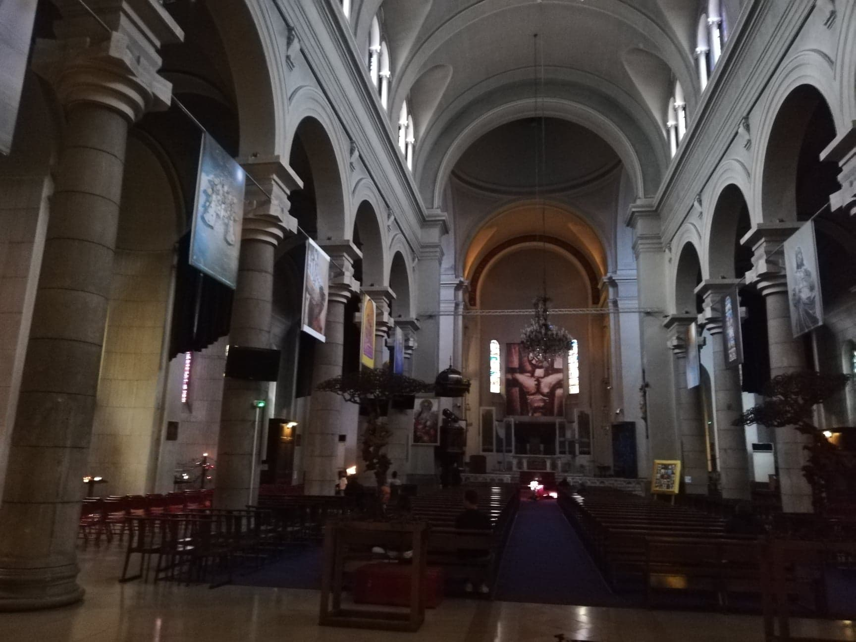 église Saint-Pierre d'Arene de Nice